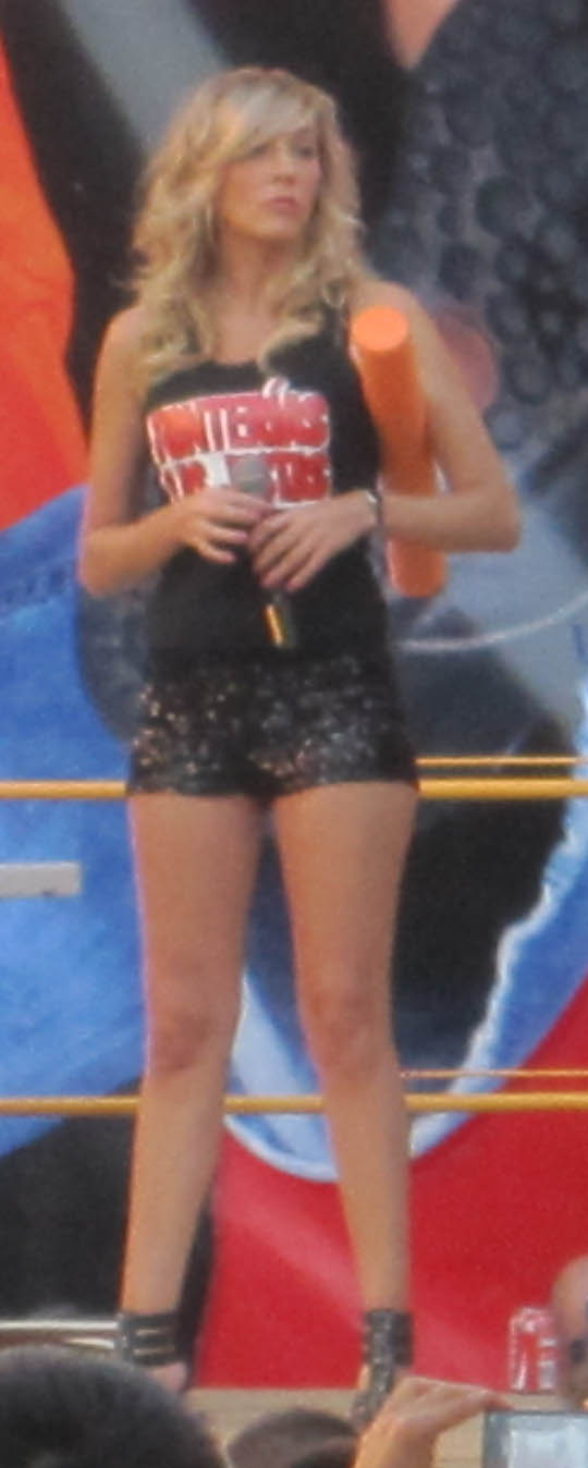 Anna Simon durante la "macrogamba" celebrada en Astorga (León, España) en agosto de 2010.